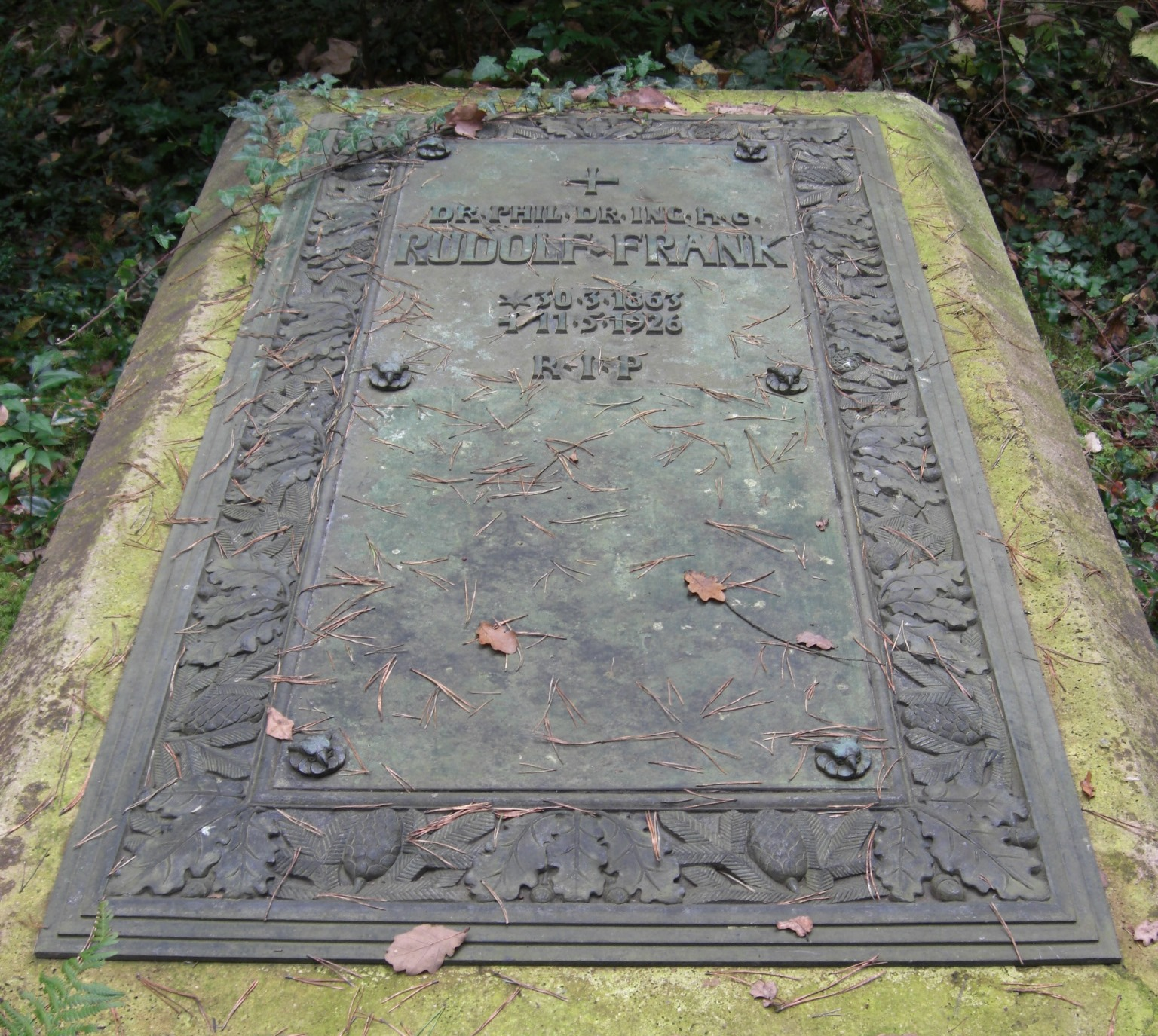 Grab des Chemikers und Industriellen Rudolf Frank (1863-1926) auf dem Südwestkirchhof in Stahnsdorf